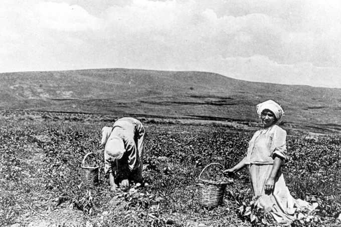 בנות בחוות העלמות באיסוף ירקות . צילום ליאו קאהן 1912 - מושבה כנרת/מוזיאון